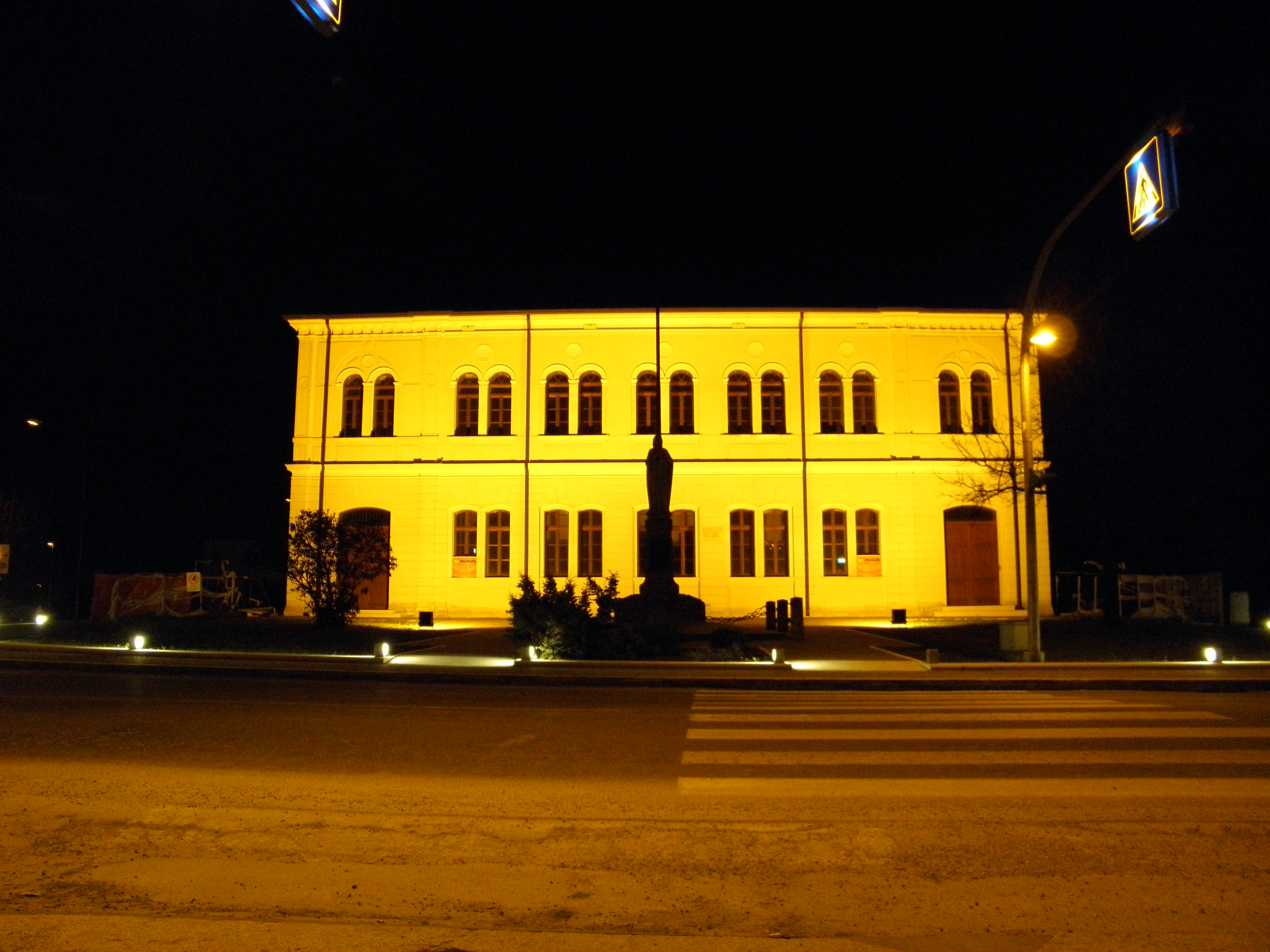 Baruchella: vista notturna del municipio del comune di Giacciano con Baruchella, provincia di Rovigo.